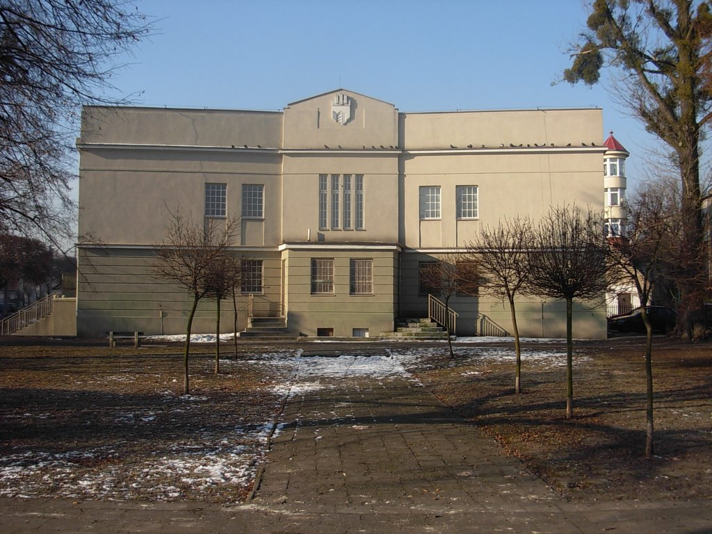 Dawny budynek łaźni miejskiej na Szwederowie w Bydgoszczy